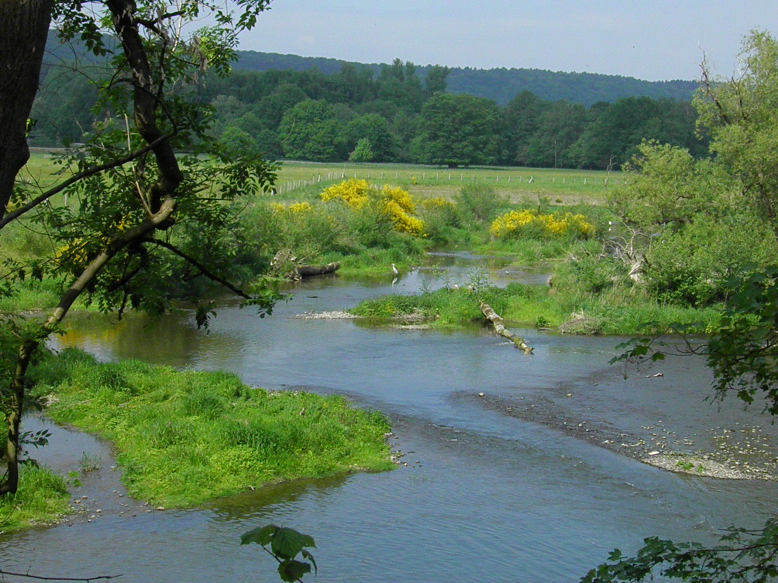 NRW Landkreis Unna FFH-Gebiet Echthausen Nr. DE-4413-301 Ruhraue